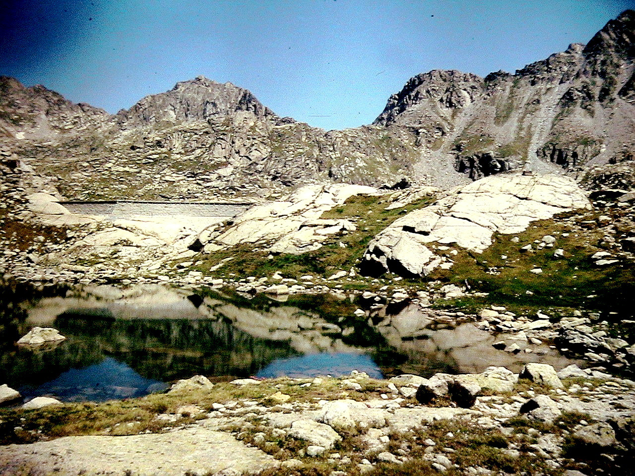 Preses de recreixement al sud de l'Estany de Mar. Foto presa de la projecció d'una diapositiva.